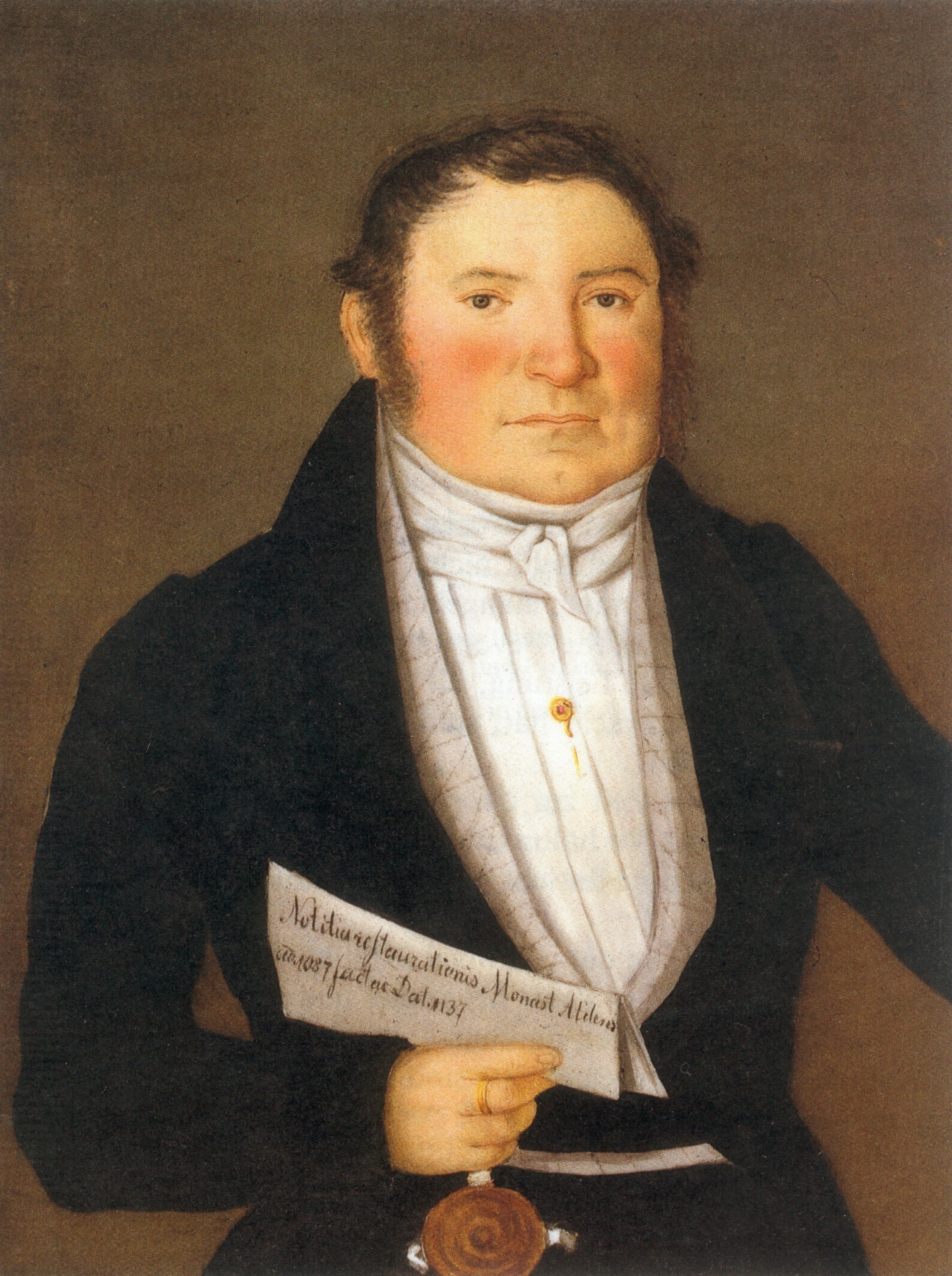 Joseph Heiserer, Ölgemälde 1840